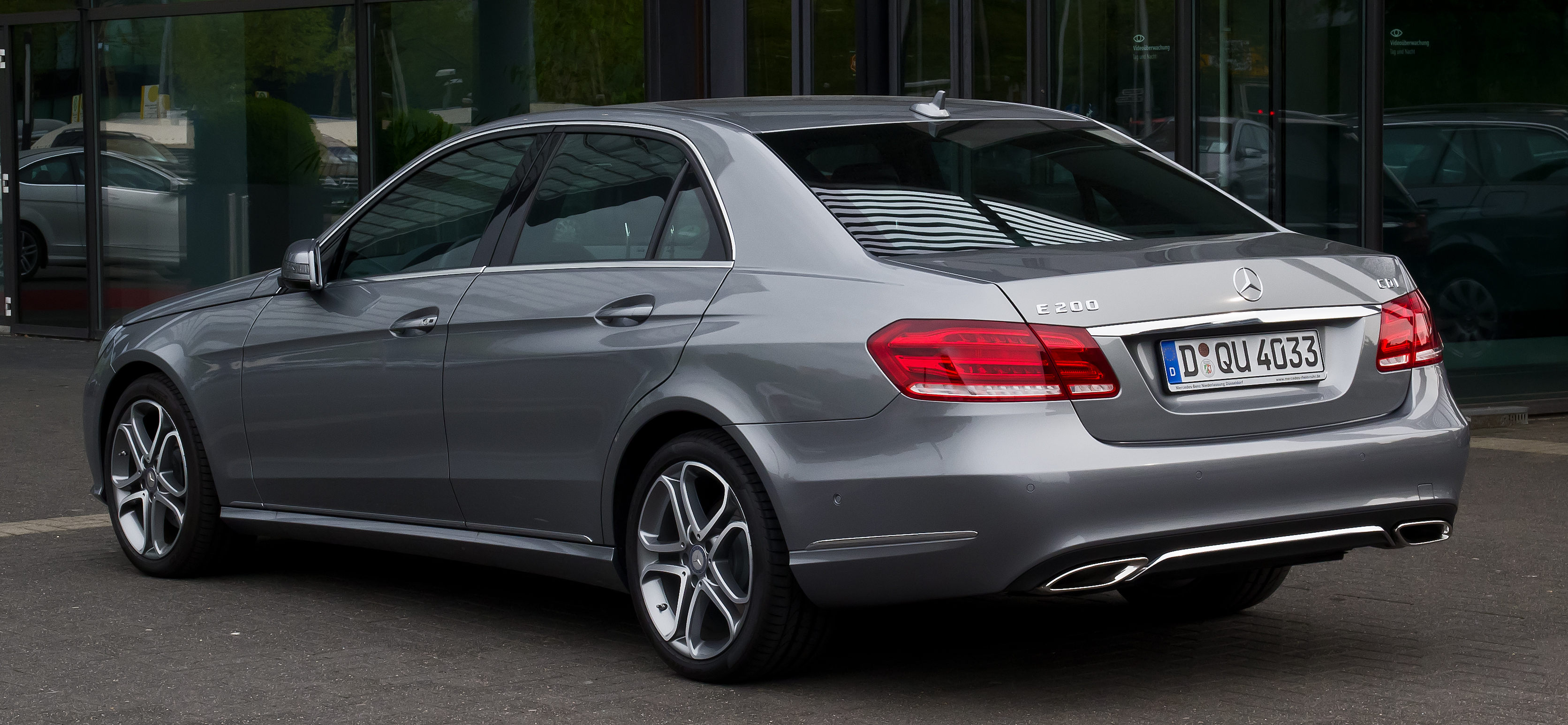 Mercedes-Benz E 200 CDI Avantgarde (W 212, Facelift)